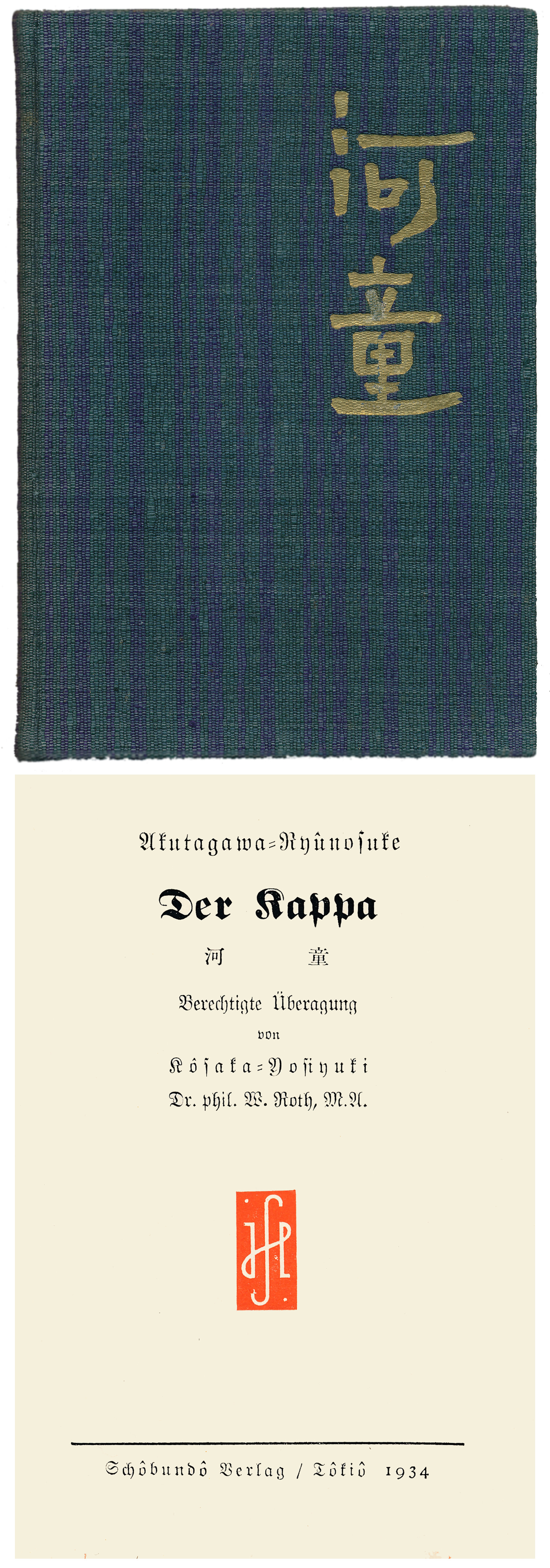 Der Kappa